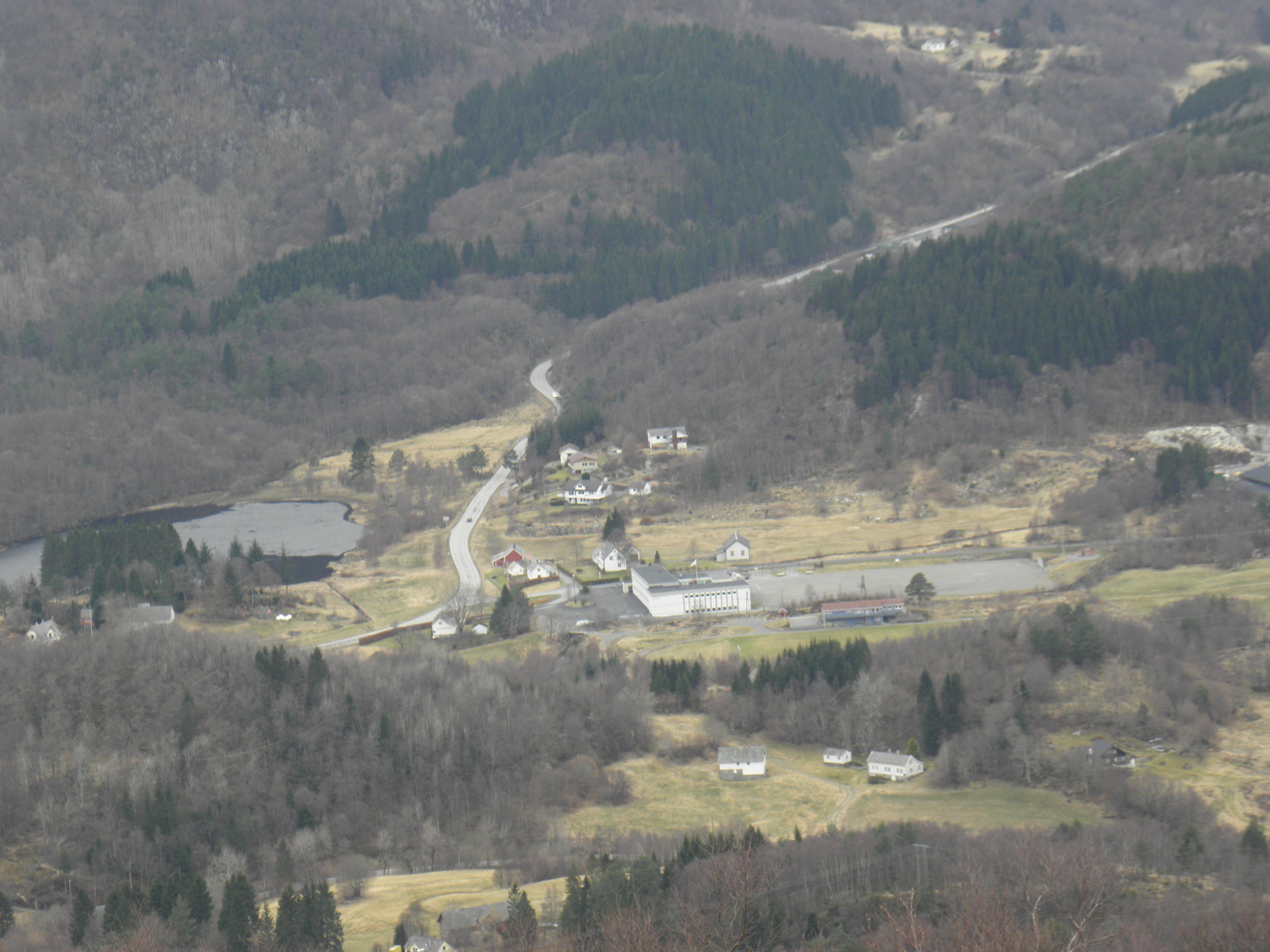 Biletet syner ein del av Uggdal i Tysnes kommune i Hordaland. Midt på biletet ligg Uggdal skule og eine grasbanen til fotballaget Njardar/Tysnes. Fylkesveg 49 gjeng gjennom biletet.